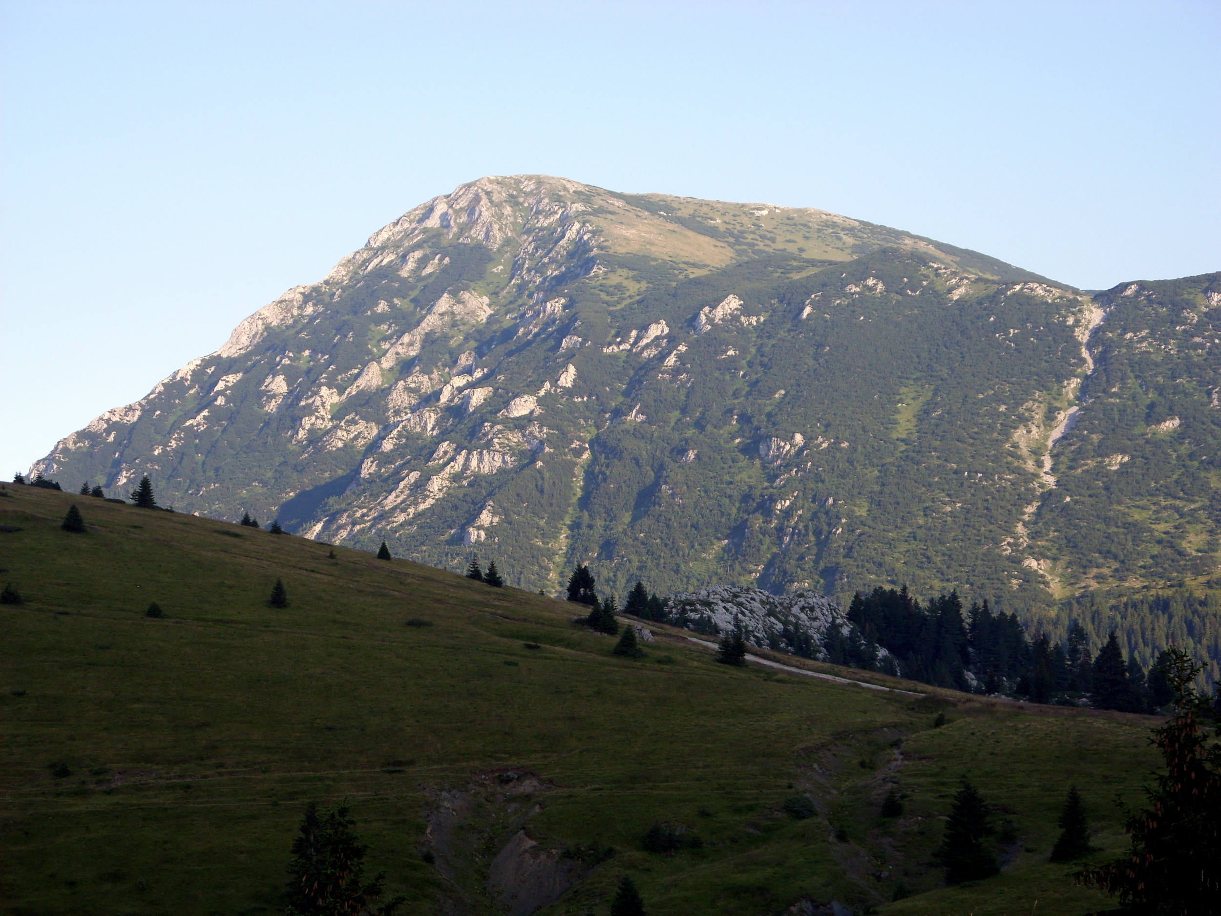 In der Mokra Gora an der Grenze zwischen Montenegro und Kosovo.